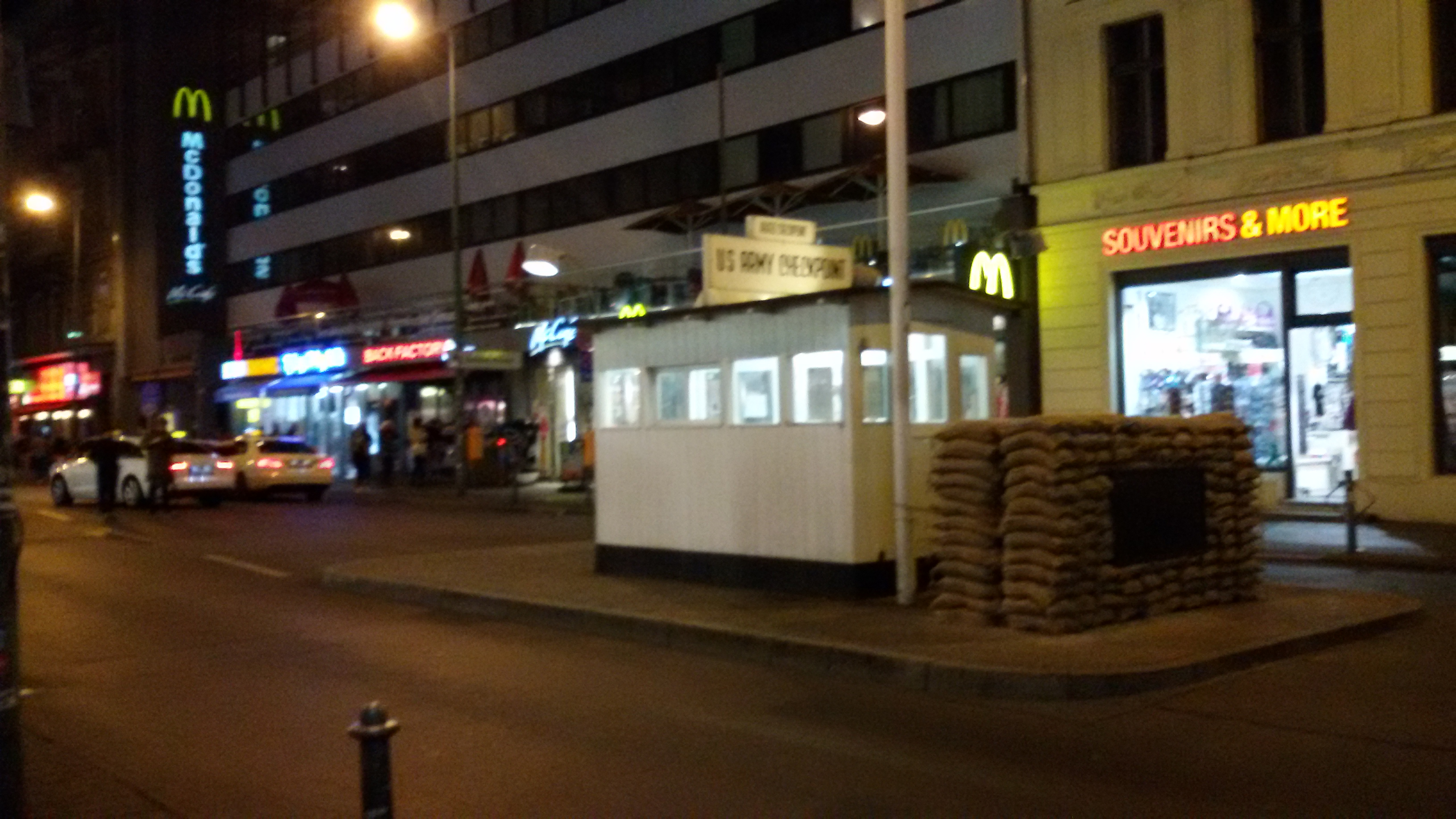 Check Point Charlie today